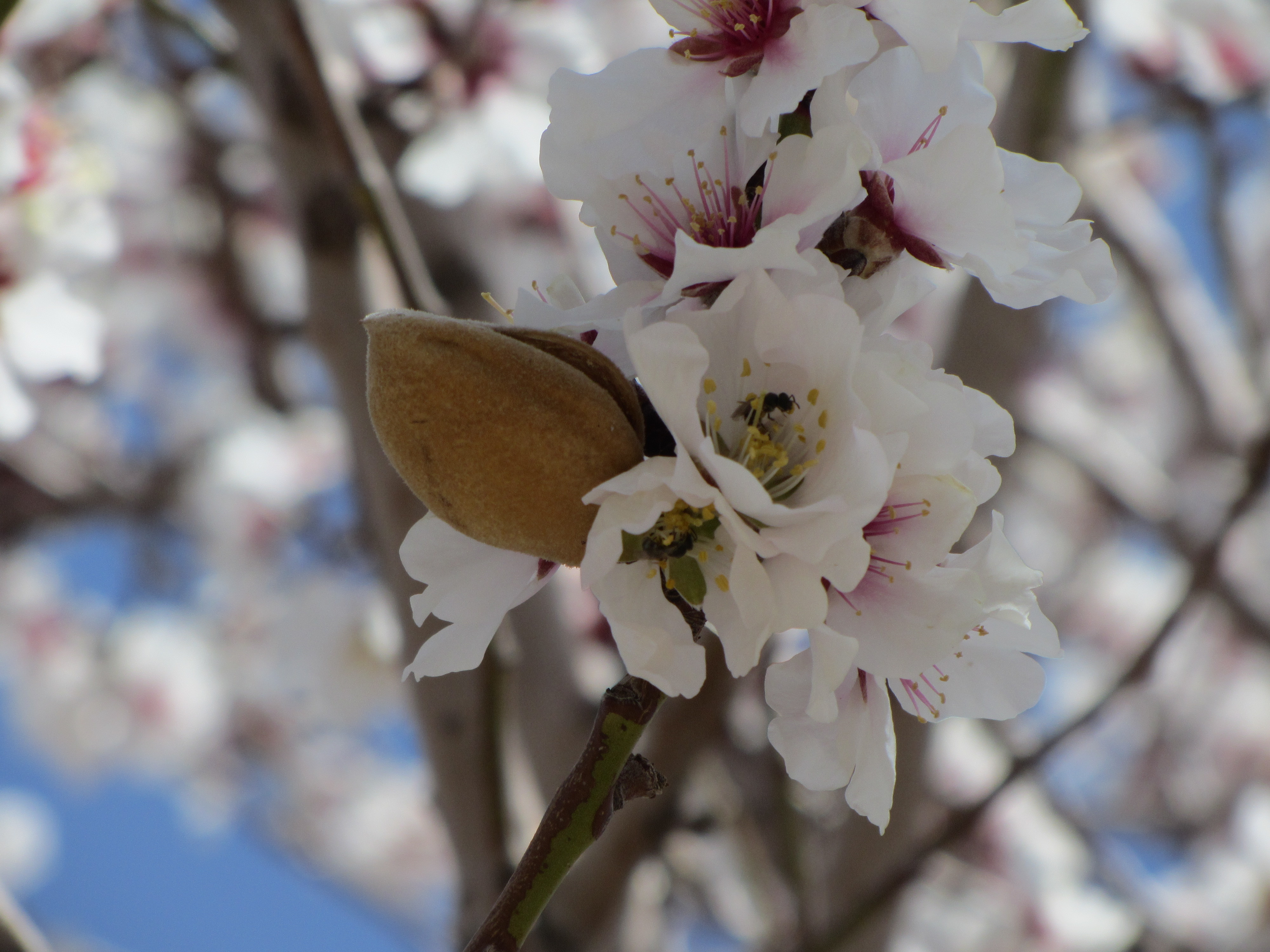 شکوفه بادام بهار، کنار بادام سال پیش در آبادی عطرافشان اصفهان